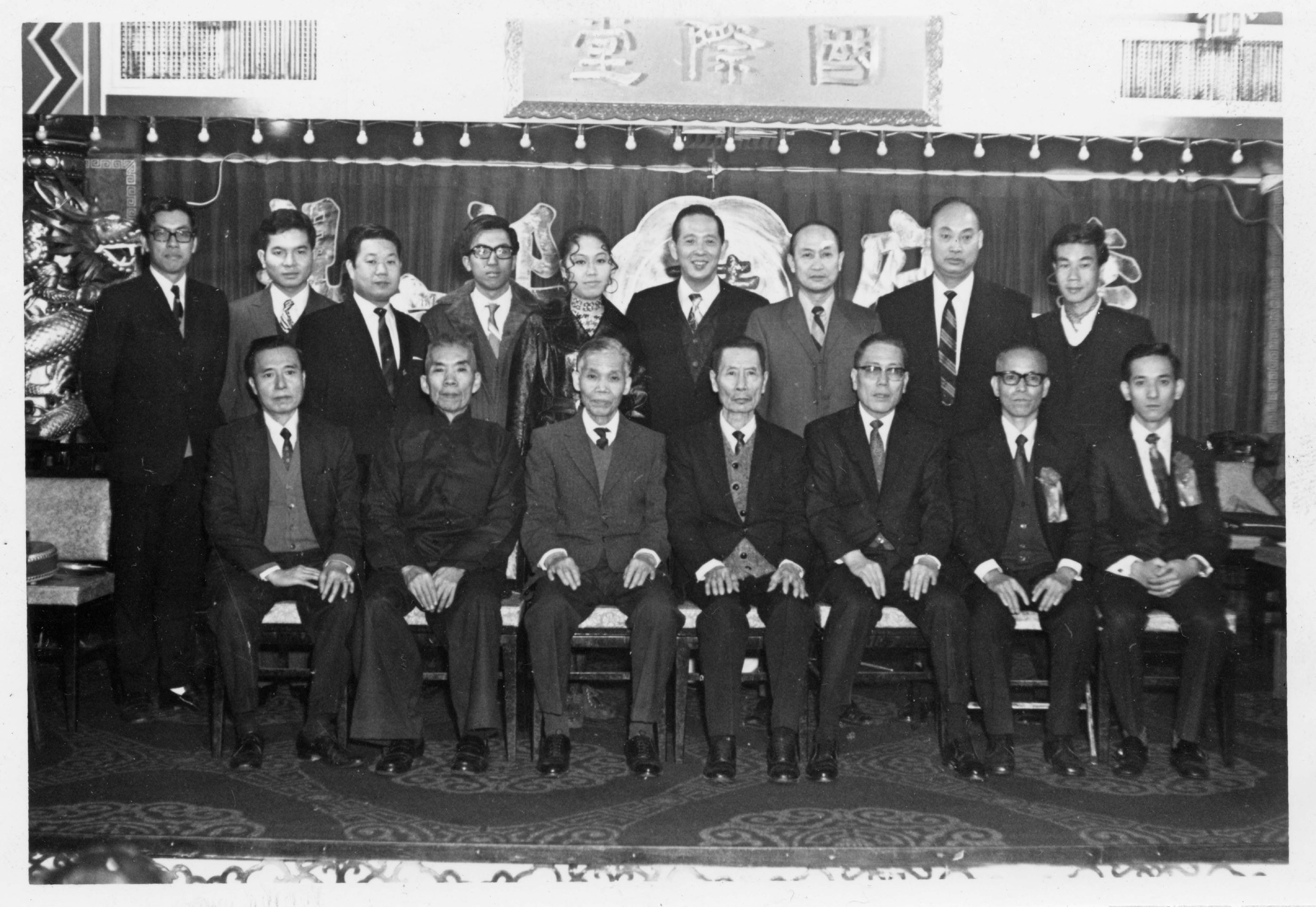 Die Fünf Drachen von Hongkong mit Schülern